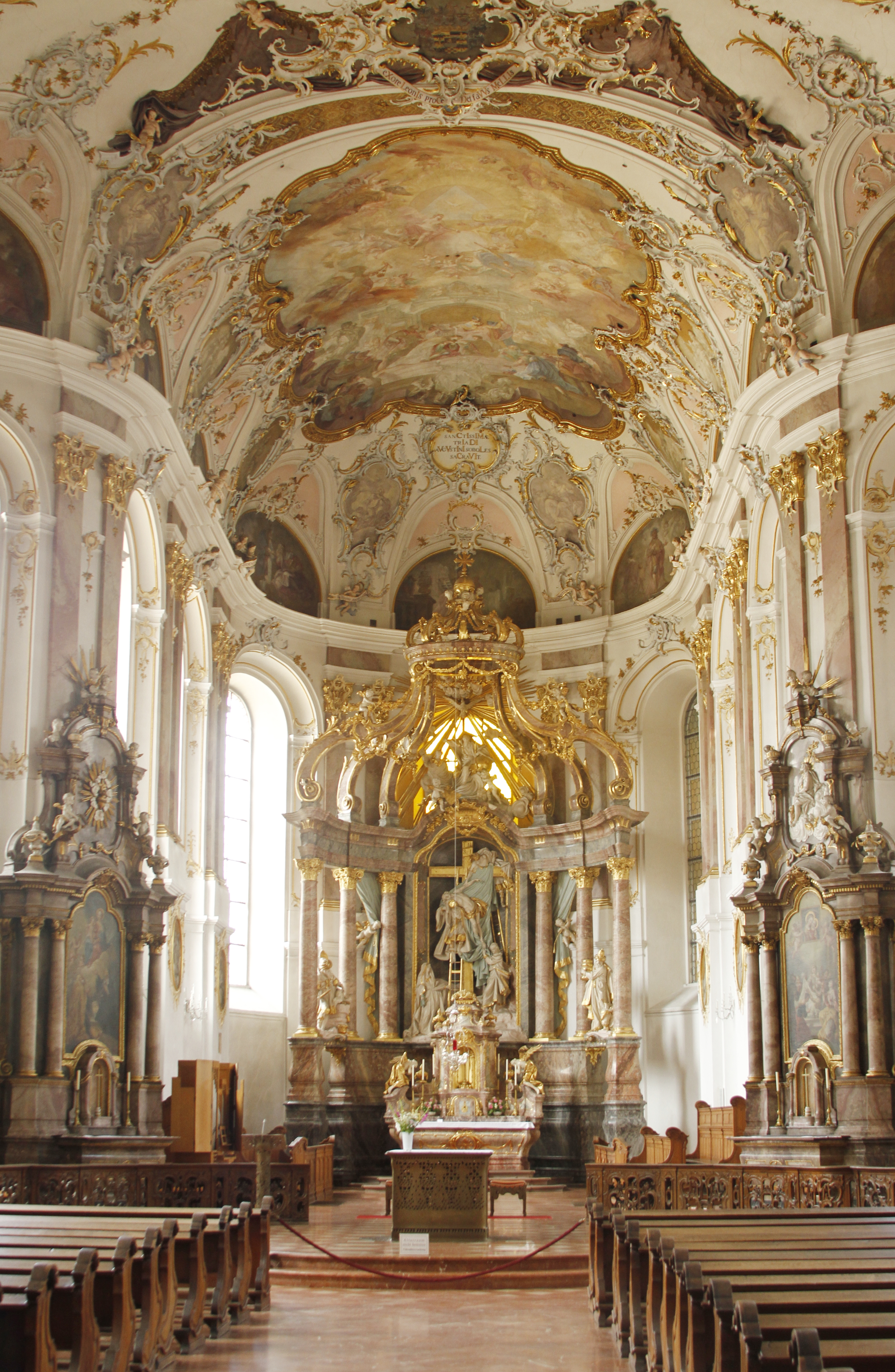 Augustinerkirche - Mainz - Germany